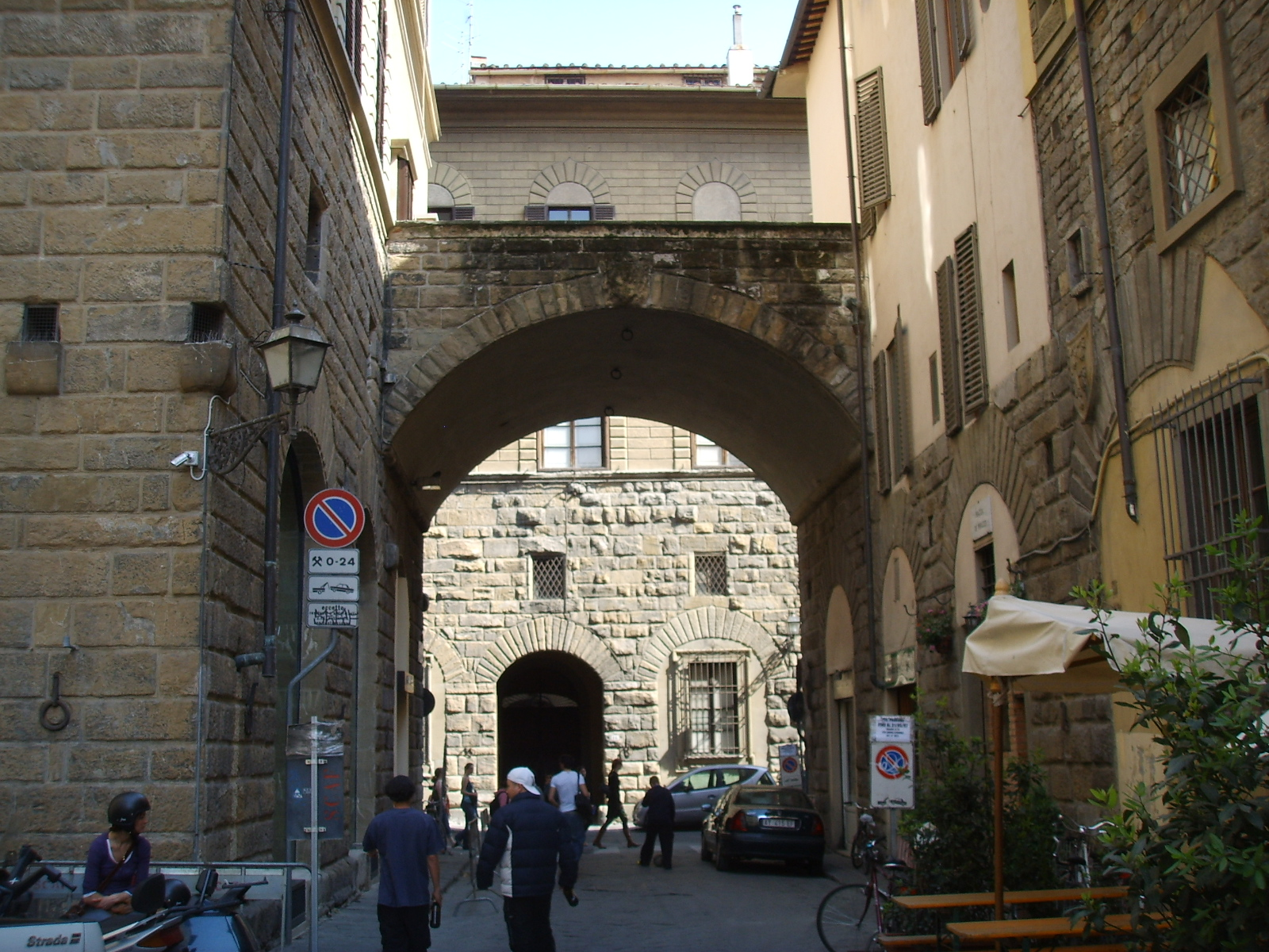 Arco_dei_Peruzzi in Florence